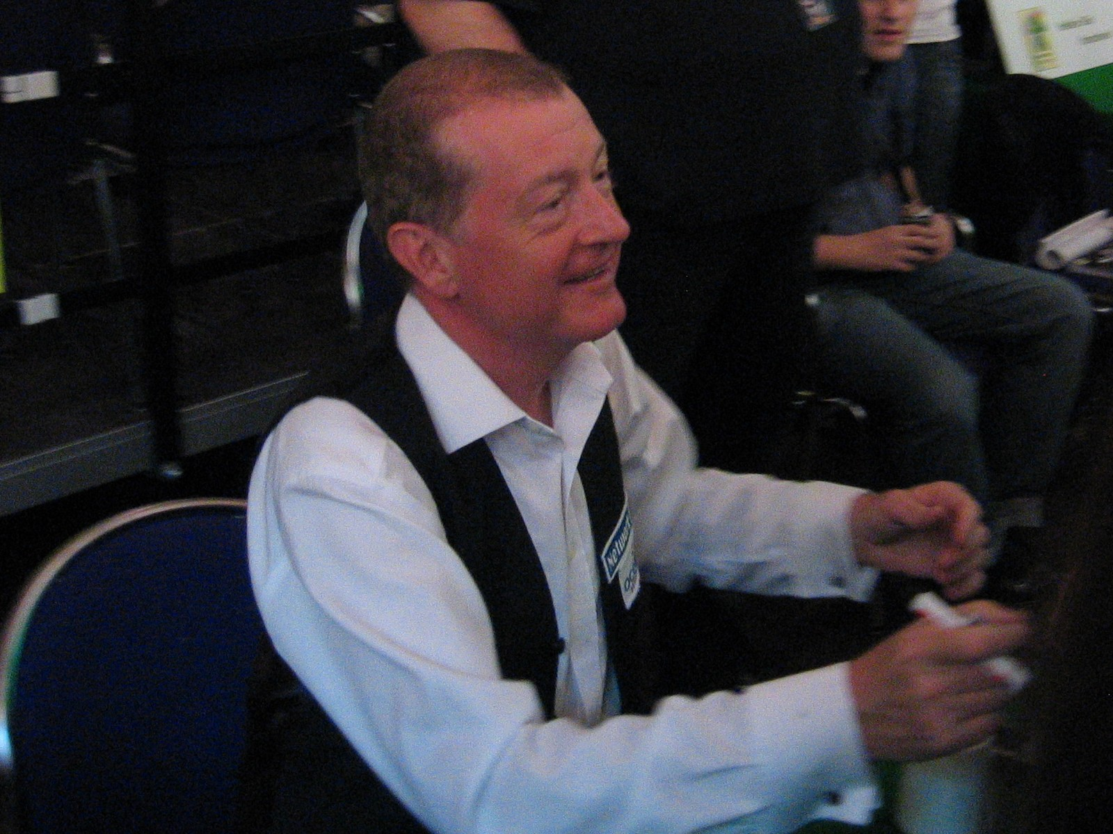 Steve Davis bei den Paul-Hunter-Classics in Fürth (2007)